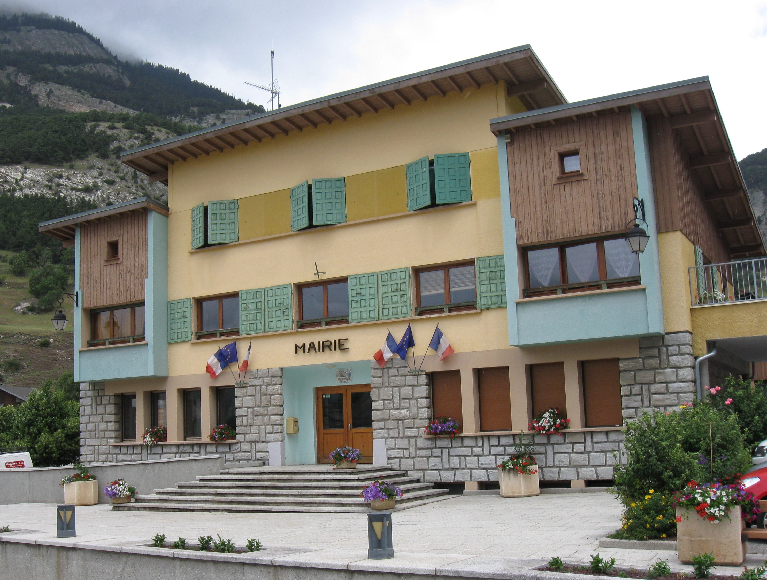 Mairie d'Avrieux. (Savoie, Rhône-Alpes).